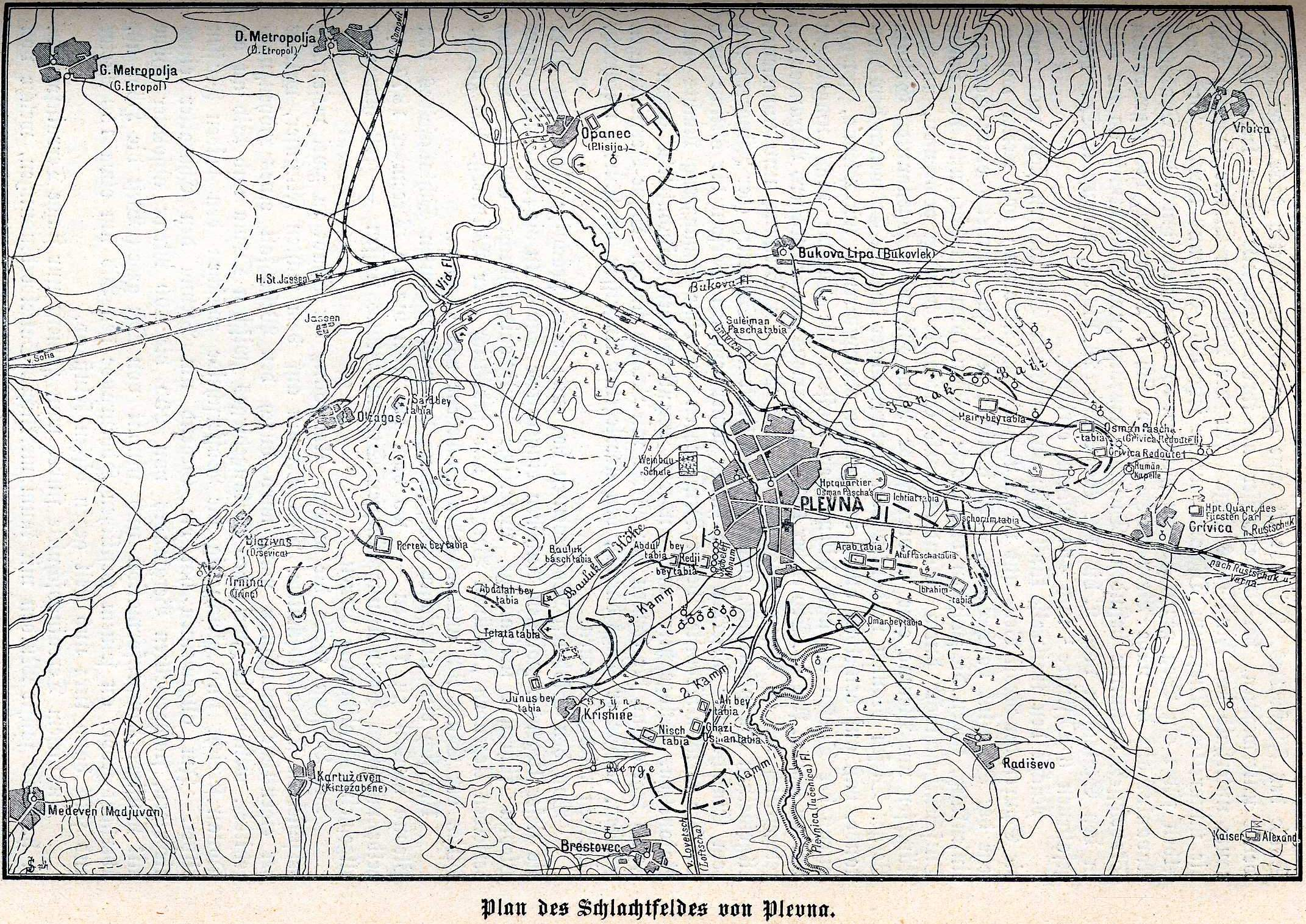 Übersichtskarte des Schlachtfeldes von Plewna und Grivica mit den türkischen, rumänischen und russischen Lager